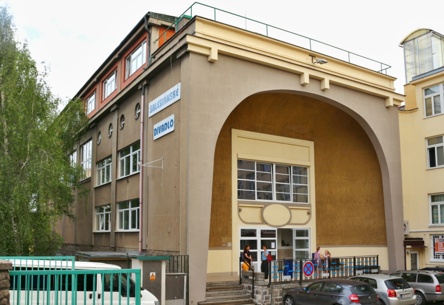 Kobylisy kostel sv. Terezie